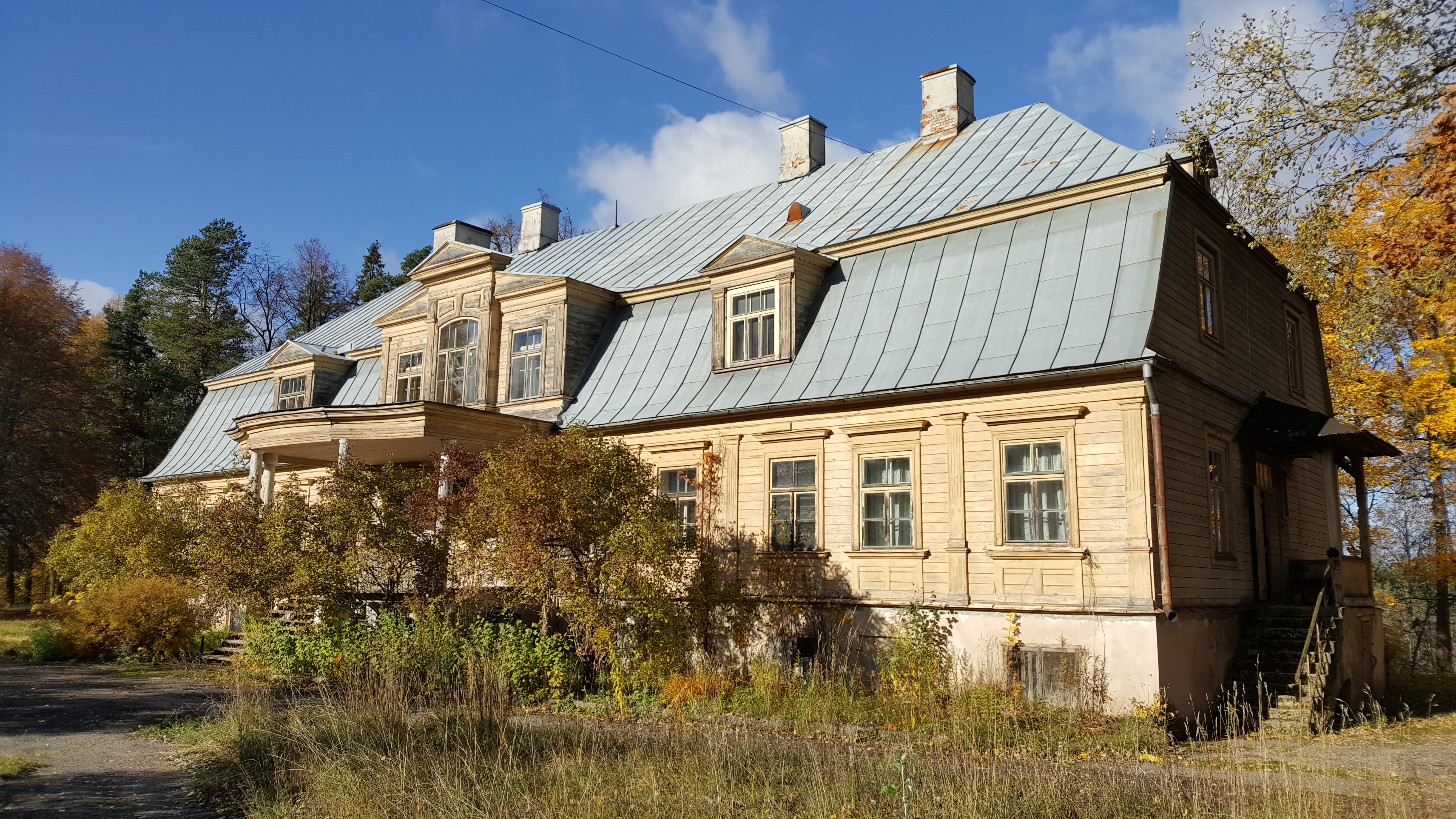 Jāņmuiža mõisa peahoone 2017. aastal